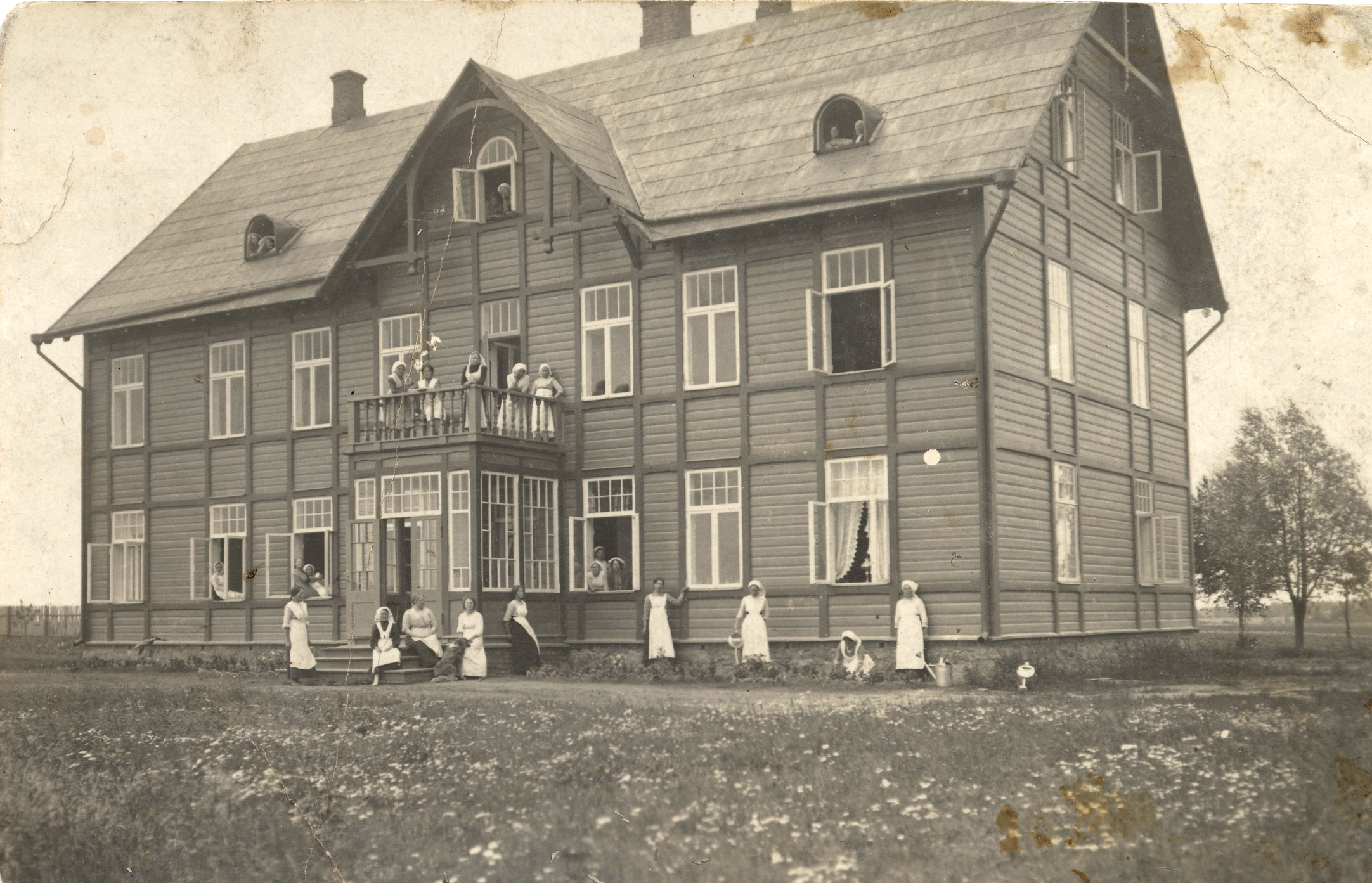 Sahkapuu põllutöö- ja majapidamiskool tütarlastele